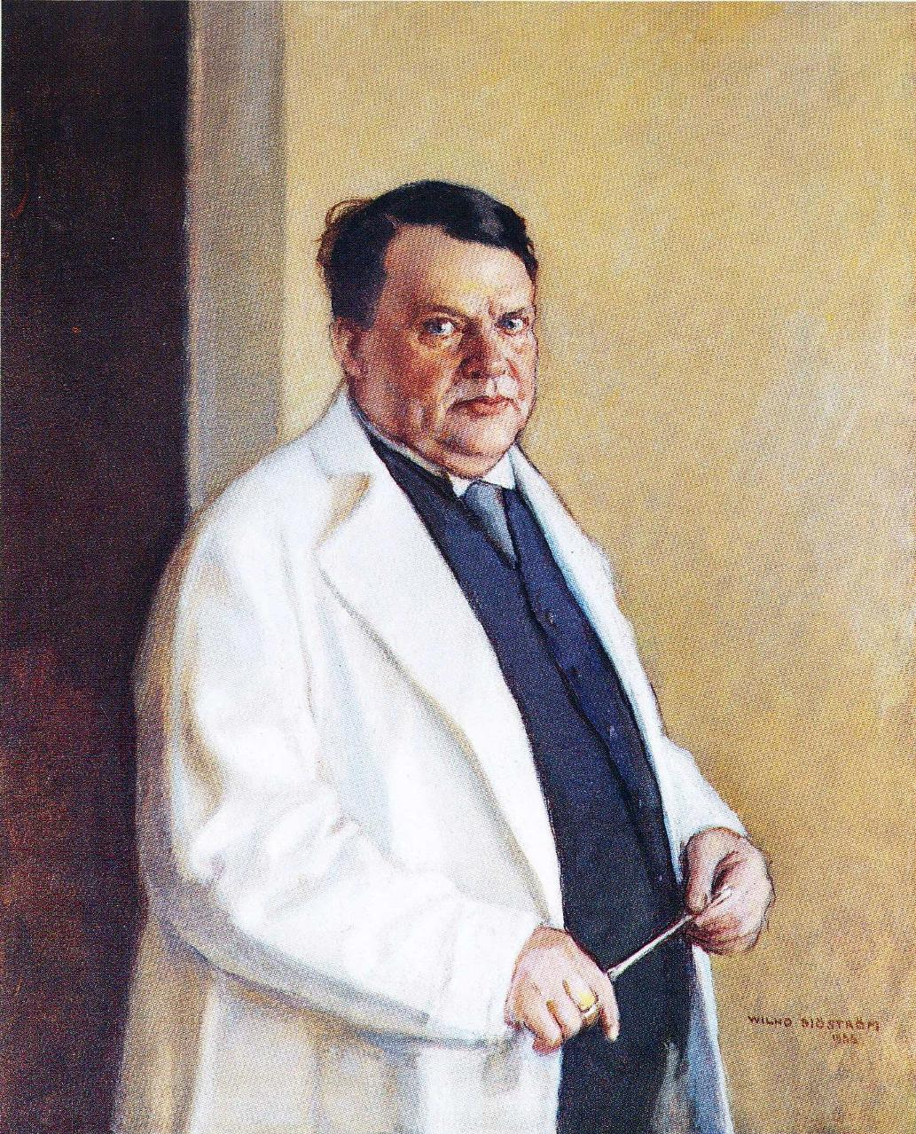 Kirurgian professori Birger Runeberg (1875–1938). Muotokuva kuuluu Helsingin yliopiston kokoelmiin.